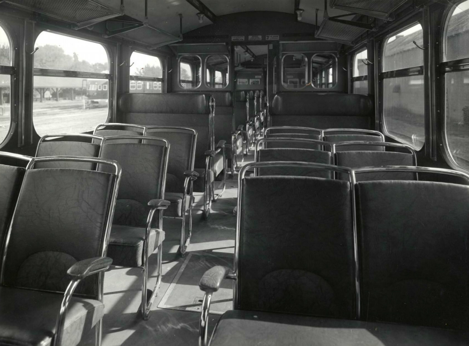 Foto van het interieur van de BC 2901 voor de Nederlandse Spoorwegen op het terrein van Werkspoor in Utrecht. Foto gemaakt door Werkspoor. Het object, uitgegeven door een instantie, is vanaf 70 jaar na publicatie niet meer auteursrechtelijk beschermd.